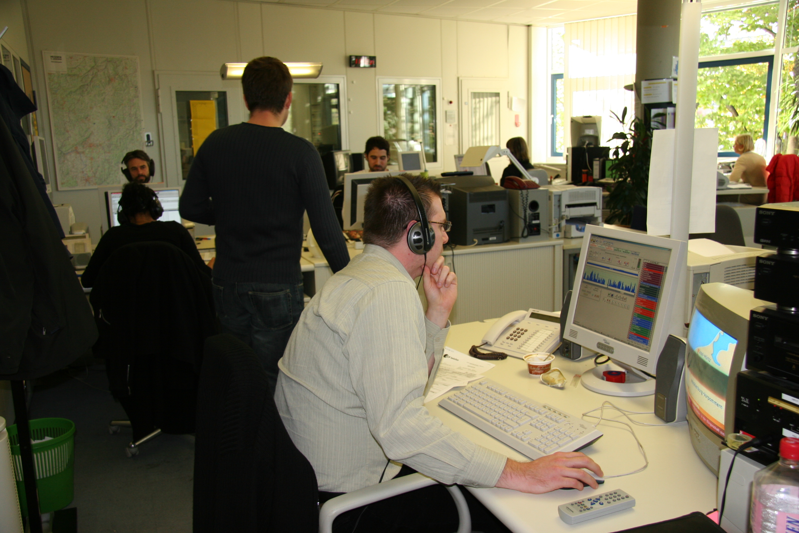 Großraumbüro von hr-Info Privataufnahme, freigegeben durch die Erstellerin